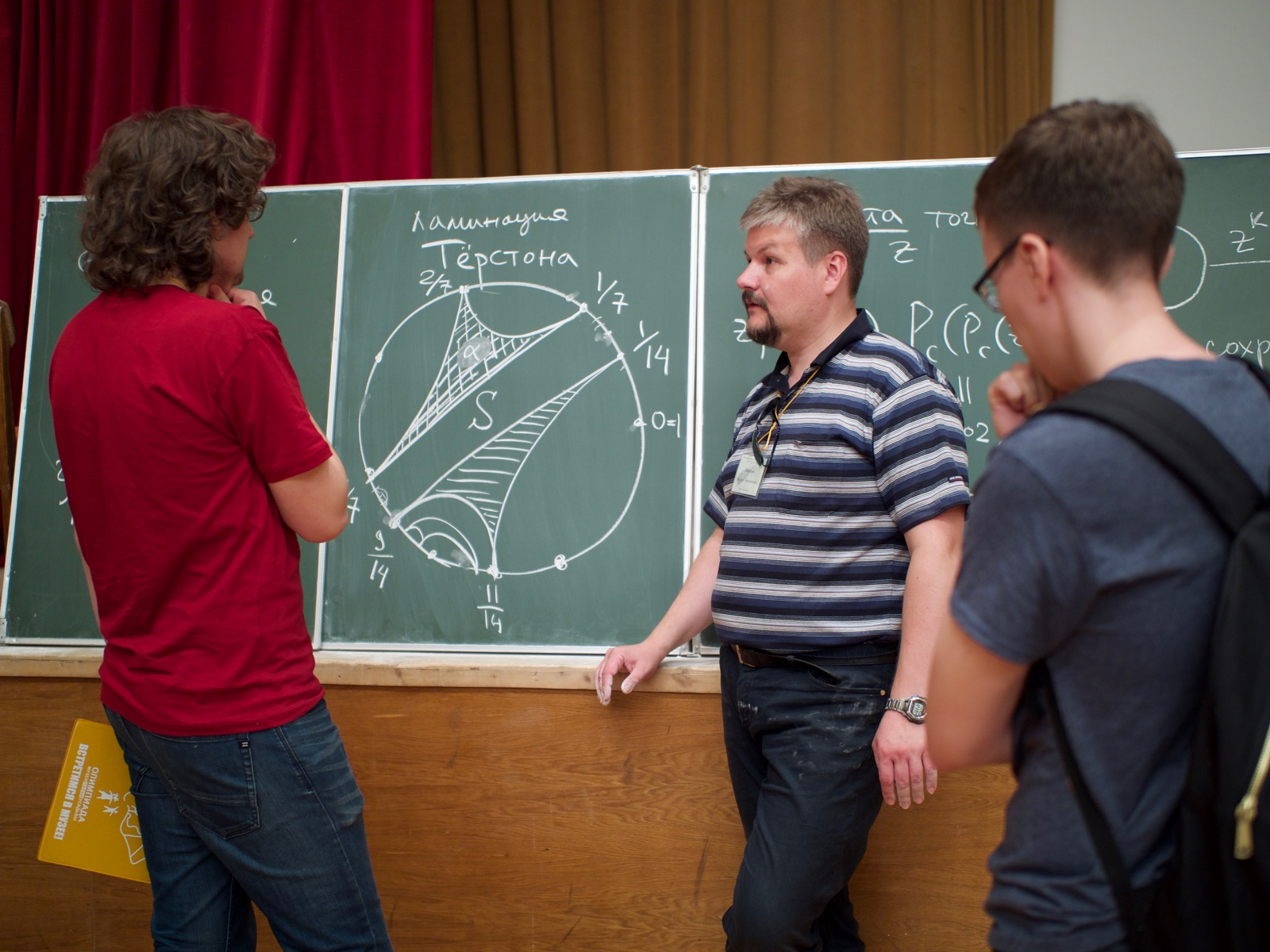 В. А. Тиморин (в центре) объясняет у доски, Летняя школа «Современная математика», 2017 год